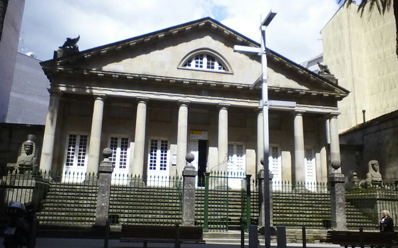 Archivo histórico provincial, casa de los Fonseca en Pontevedra capital